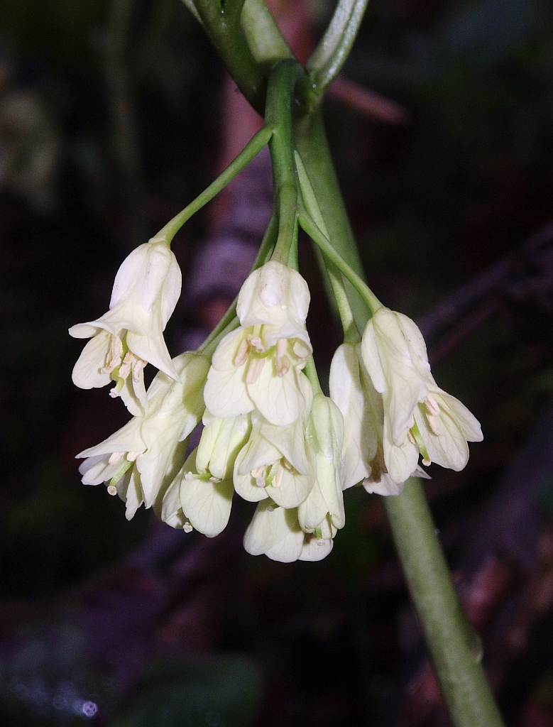 Cardamine enneaphyllos, Schwäbisch-Fränkische Waldberge, Germany